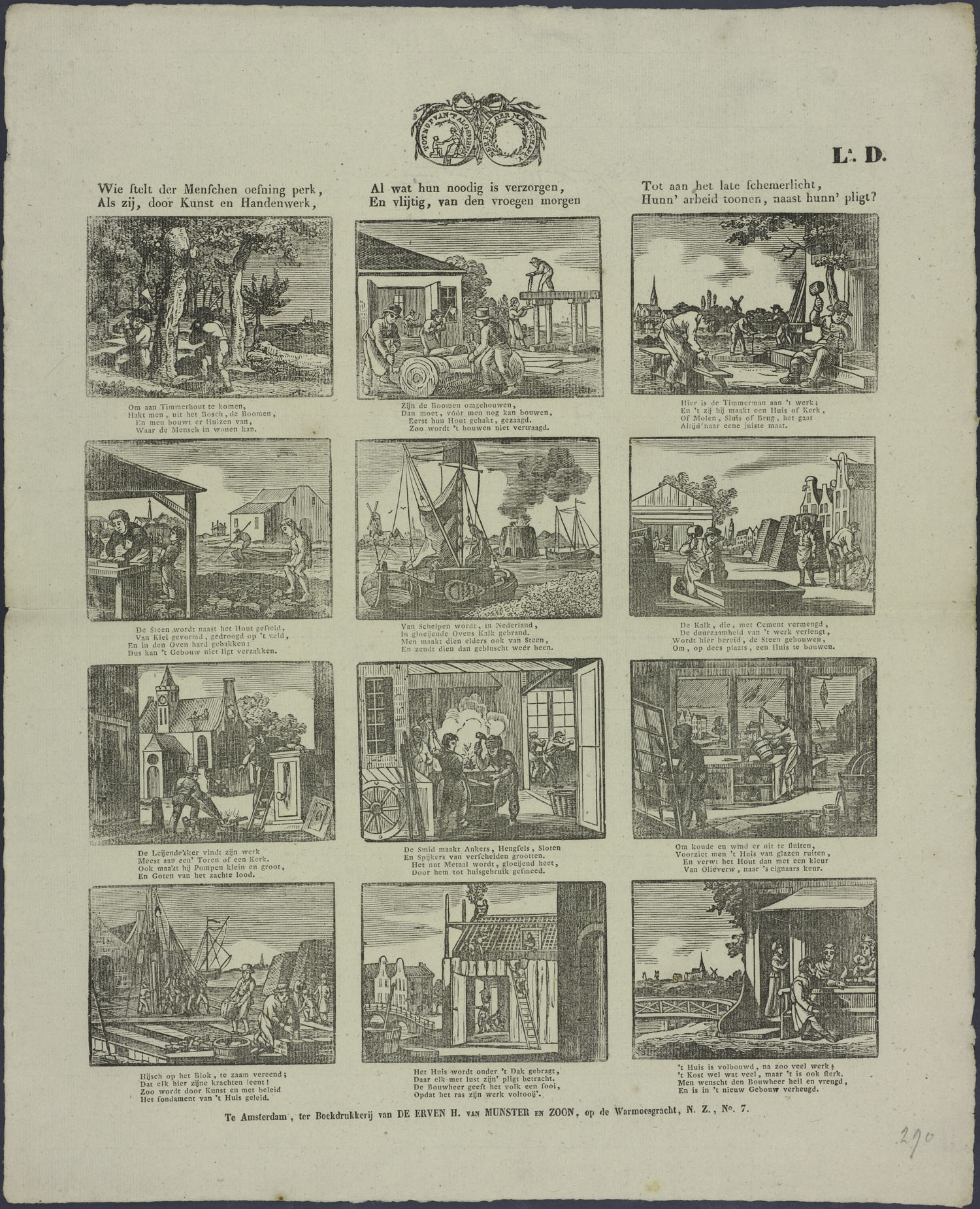 Centsprent met 4 x 3 houtsneden met afbeeldingen van werkzaamheden in de bouw: houthakken, bomen verzagen, timmerwerk, stenen bakken, kalk branden, cement maken, steenhouwen, leien dekken, spijkers en sloten smeden, glazen maken, verven, heien, vieren dat het dak er op zit, en dan is het huis klaar. Bevat vierregelige rijmende onderschriften.